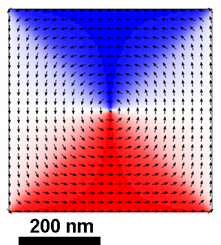 Cấu hình mômen từ cho một phần tử từ tính hình vuông